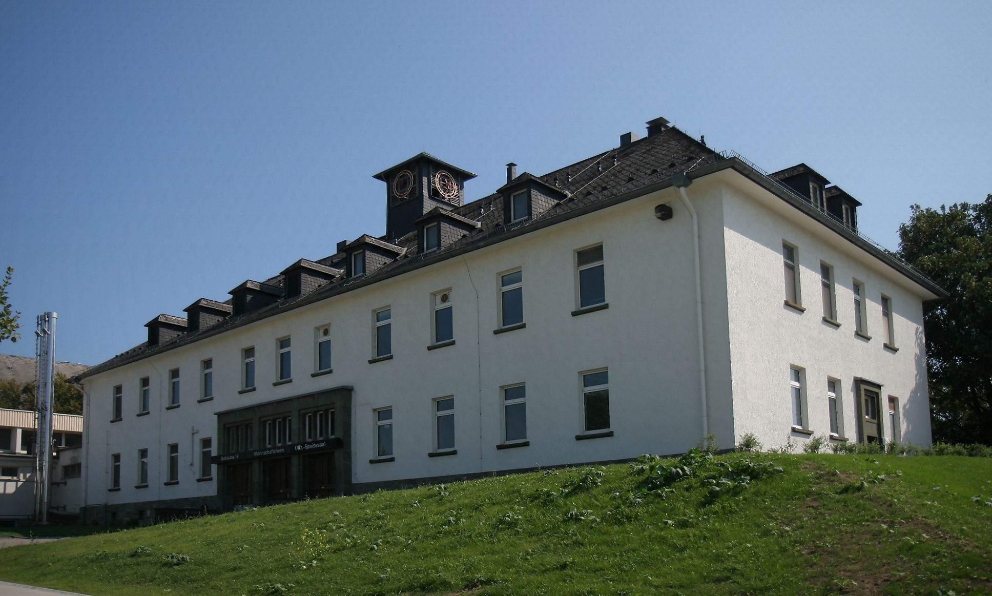 Gebäude 18 (ehemaliges Mannschaftsheim und Uffz.-Speisesaal) der Blücher-Kaserne in Hemer.